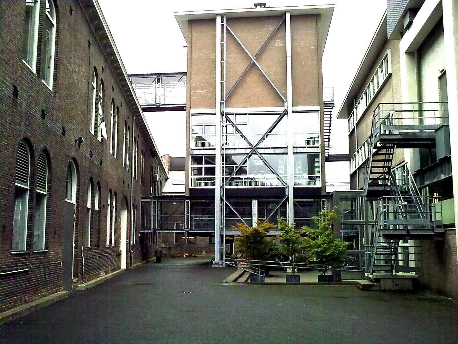 Binnenplaats van de voormalige cavaleriekazerne aan de Sarphatistraat in Amsterdam, sinds 1992 Rijksacademie van Beeldende Kunsten. De kazerne is een carré rond een binnenplaats. Op de begane grond waren stallen voor 200 paarden; de manschappen sliepen op de verdieping. Architect Koen van Velsen ontwierp voor de academie enkele gebouwen op de binnenplaats, die via loopbruggen verbonden zijn met elkaar en met het oude gebouw.